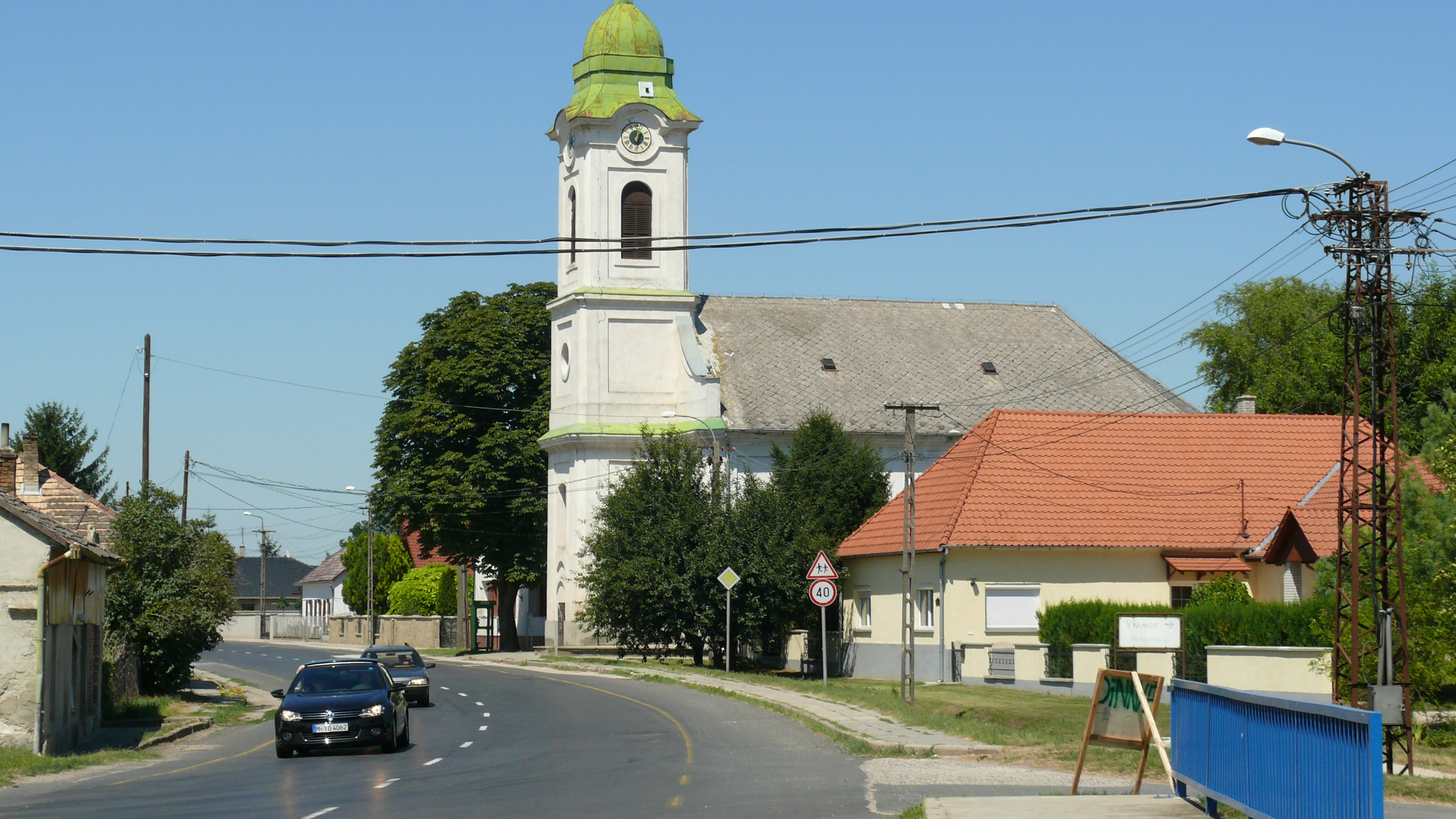 Mezőszilas, templom I.